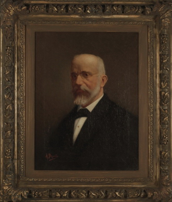 Greek PM Eleftherios Venizelos